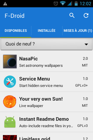 F-Droid 0.95.1 en 2015